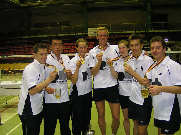 1. BC Beuel, Deutscher Mannschaftsmeister 2005